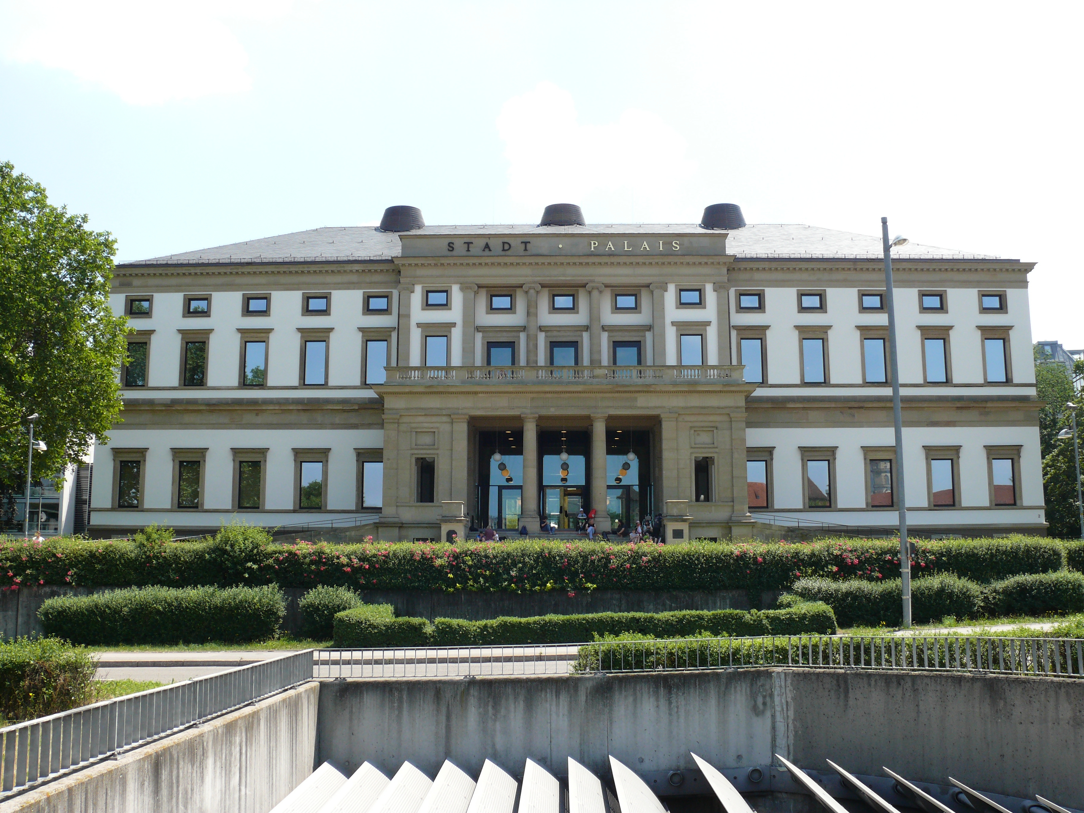 Das neue Stadtmuseum in Stuttgart (im Wilhelmspalais), nach dessen Wiedereröffnung 2018.